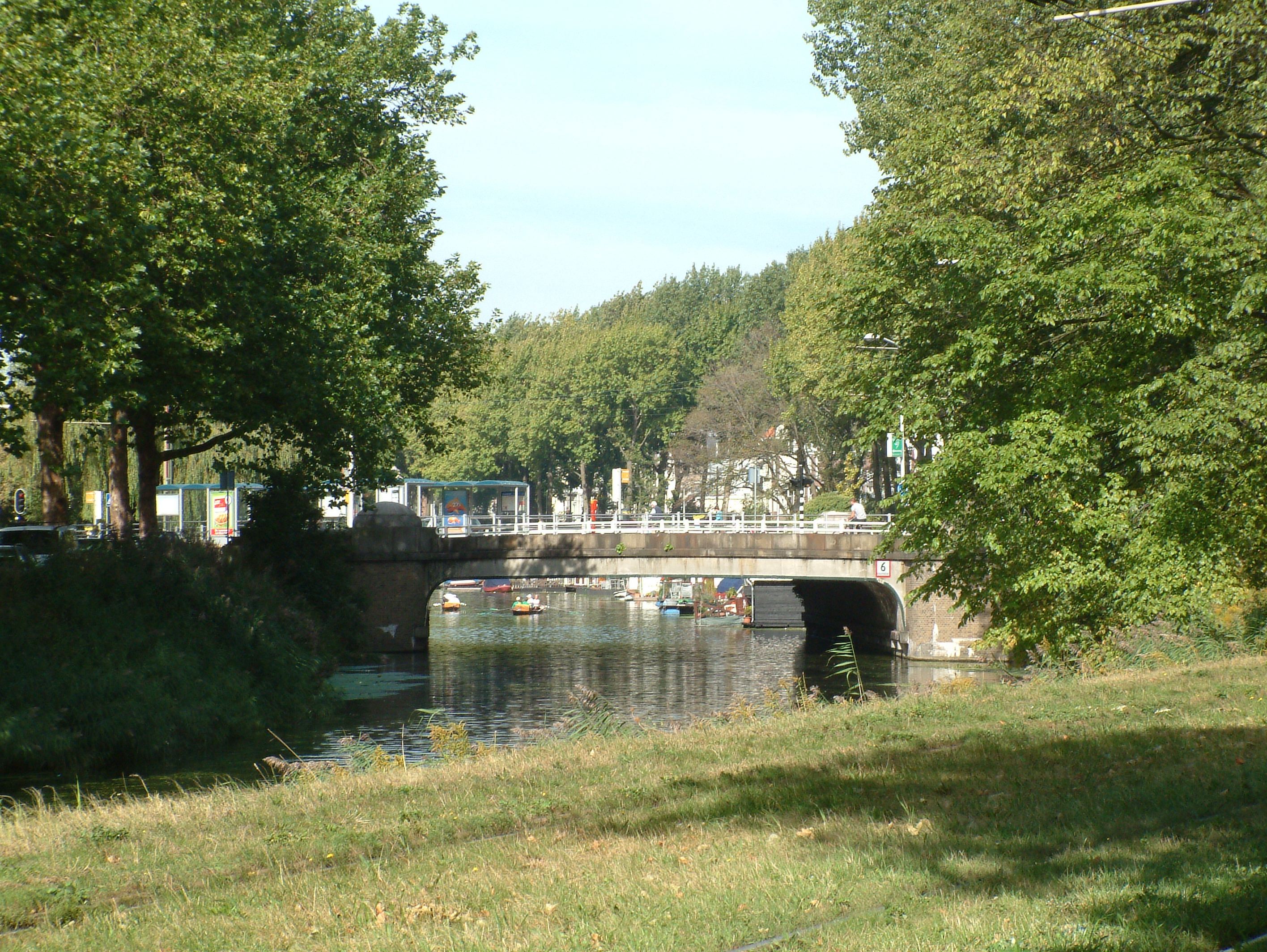 Brug in Den Haag